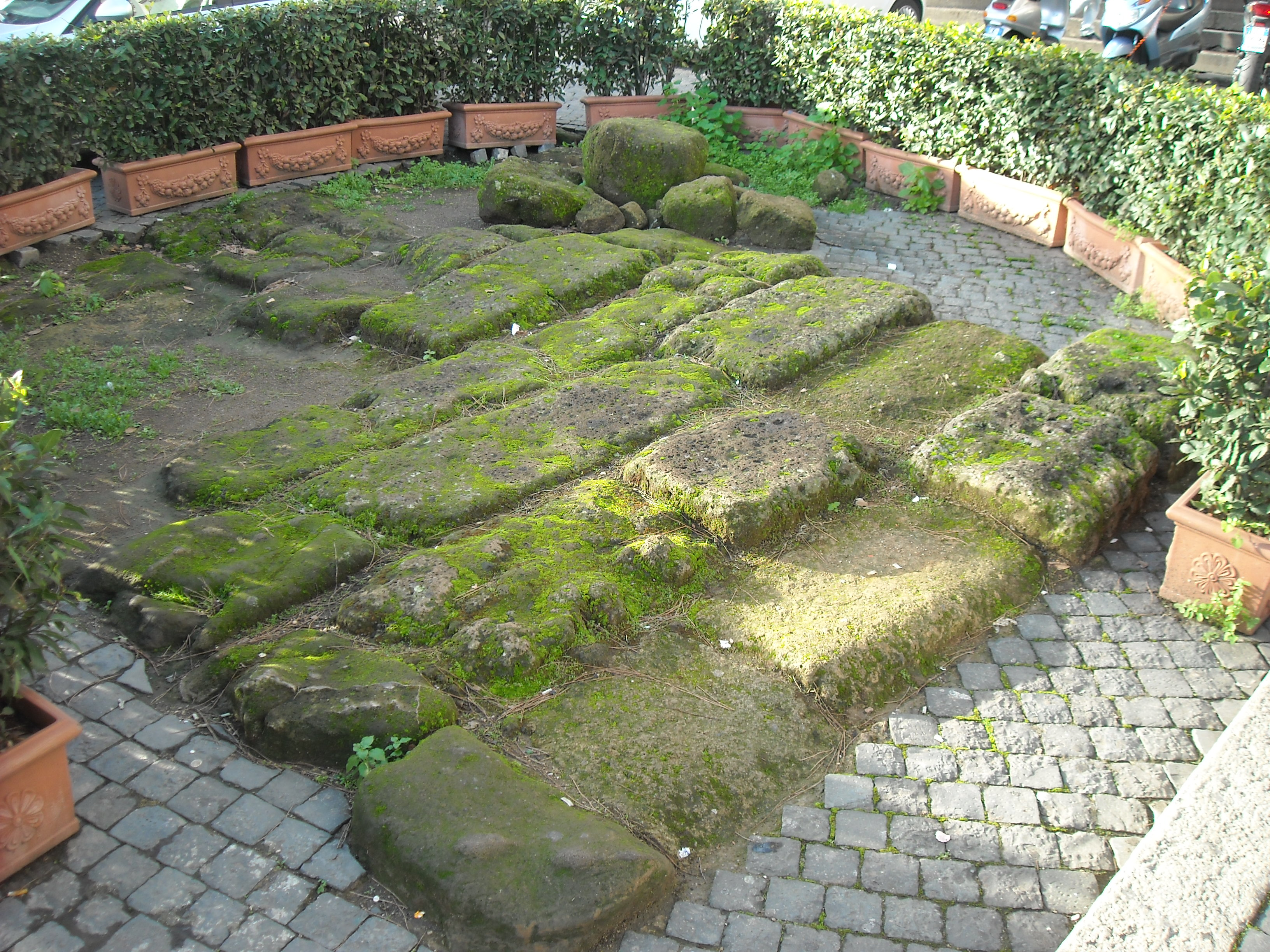 Probabili resti della Porta Fontinalis, a lato del Vittoriano